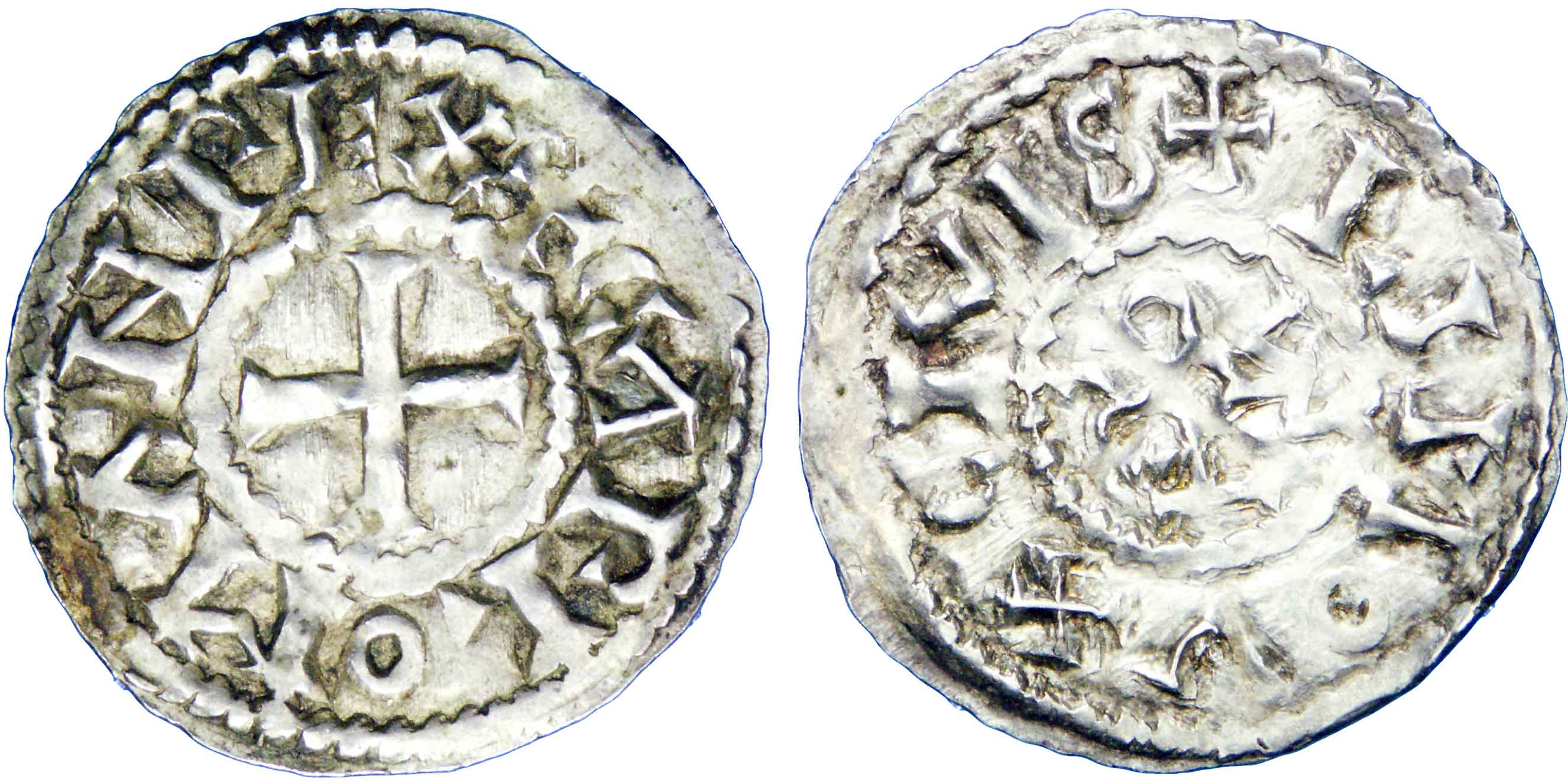 Nom de l'atelier/ville : Limoges Métal : argent Diamètre : 22,5mm Axe des coins : 3h. Poids : 1,66g. Degré de rareté : R3 Titulature avers : + CARLOMAN REX, (légende commençant à 1 heure). Description avers : Croix. Traduction avers : (Carloman, roi). Titulature revers : + LIMOV X CIVIS. Description revers : Monogramme au nom de Charles. Traduction revers : (Cité de Limoges).